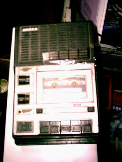 Zelfgemaakte foto van een cassetterecorder uit eind jaren zeventig.